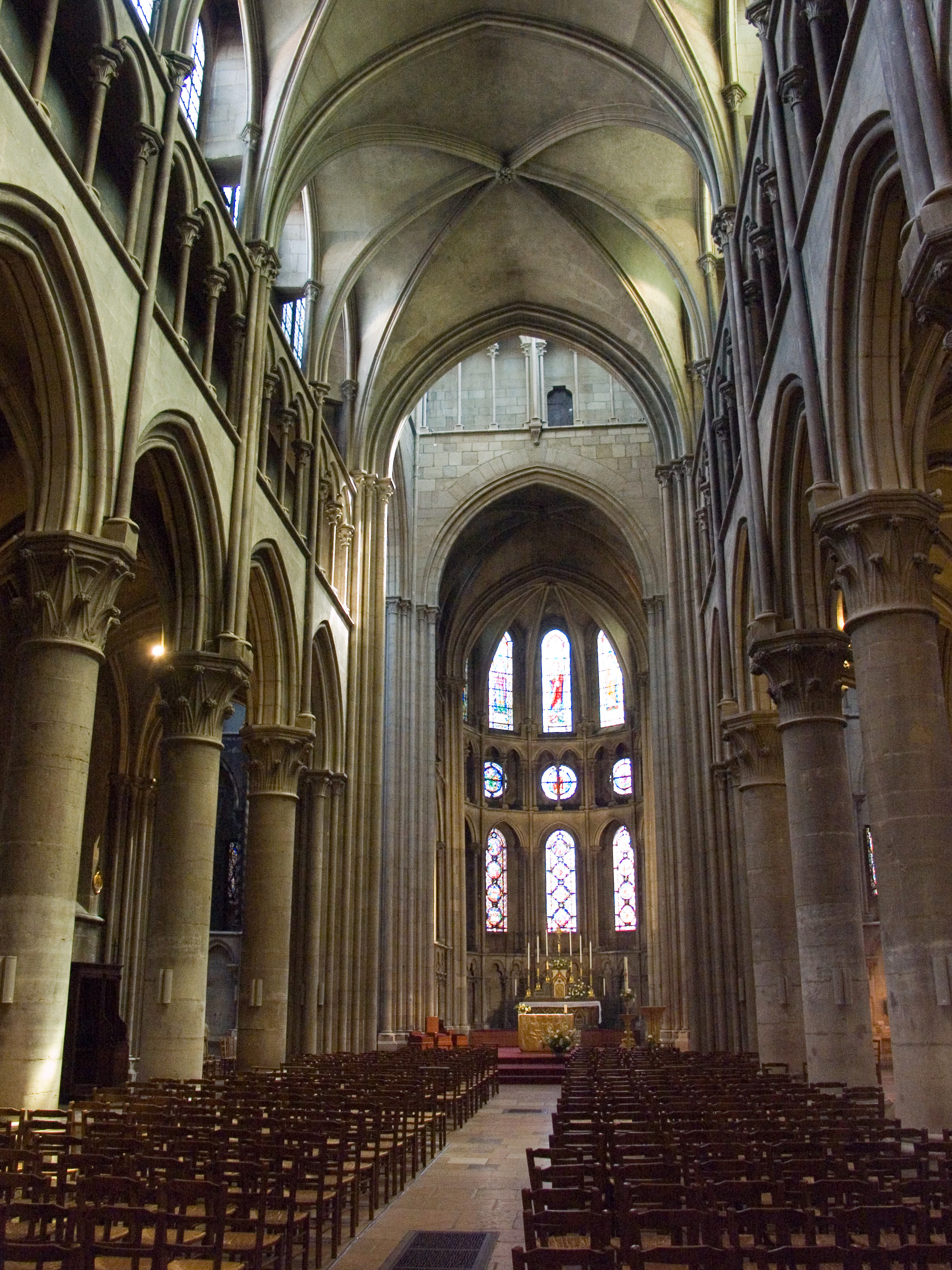 Intérieur de l'Eglise Notre Dame à Dijon